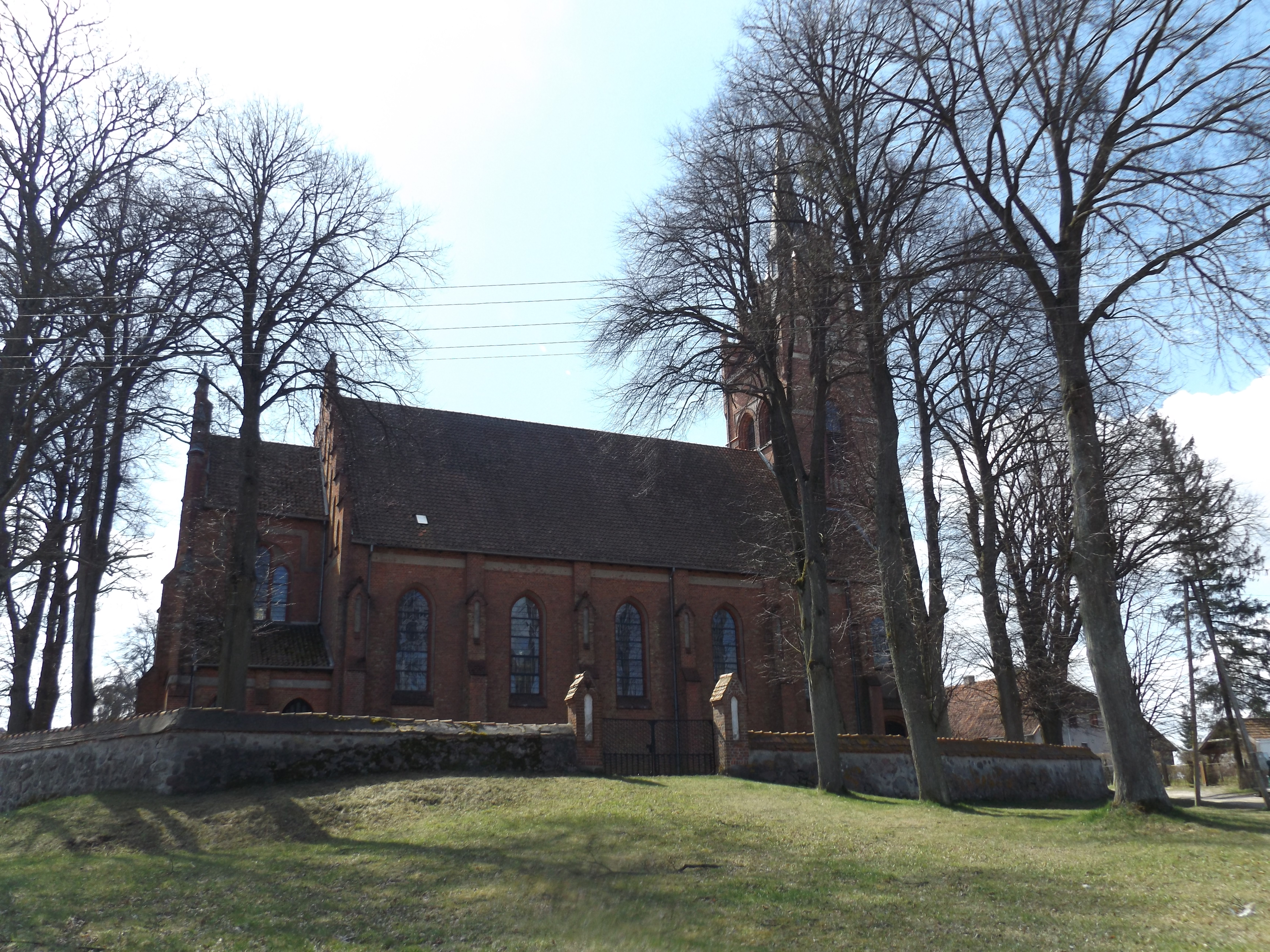 Sętal - rzymskokatolicki kościół parafialny pw. św. Mikołaja, 1910